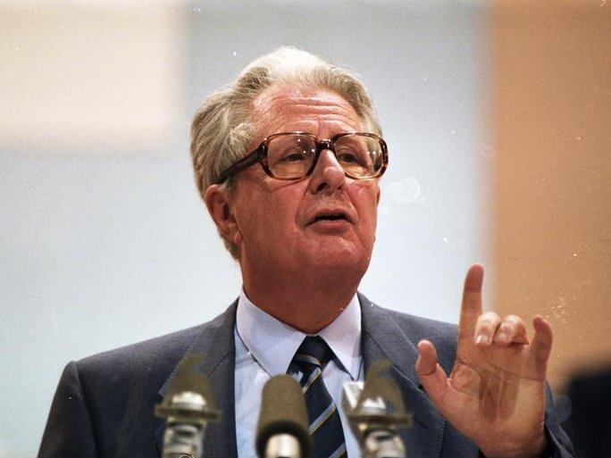 30.8.-2.9.1988 SPD-Parteitag in Münster, Halle Münsterland